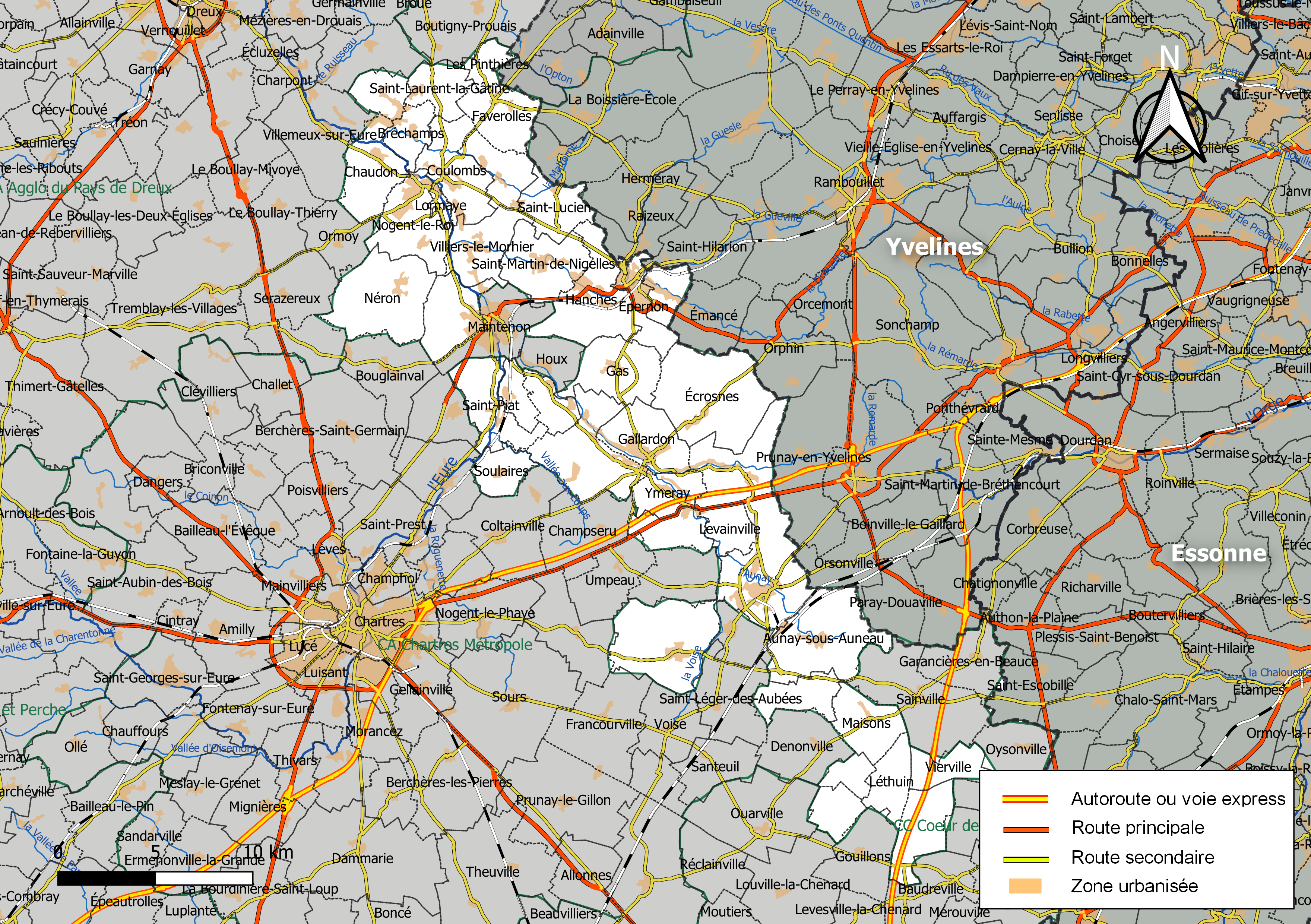 Carte géographique de la communauté de communes des Portes Euréliennes d'Île-de-France, département d'Eure-et-Loir, France. Composition au 1er janvier 2019.